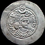 Pièce du règne de Péroz Ier